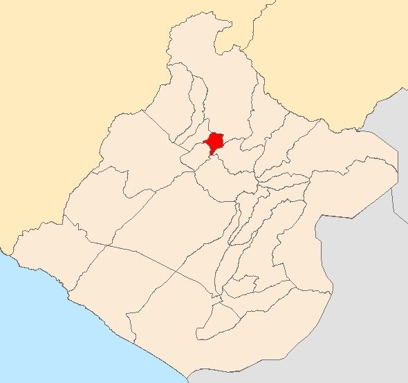 Mapa distrito Quilahuani,Tacna - Perú